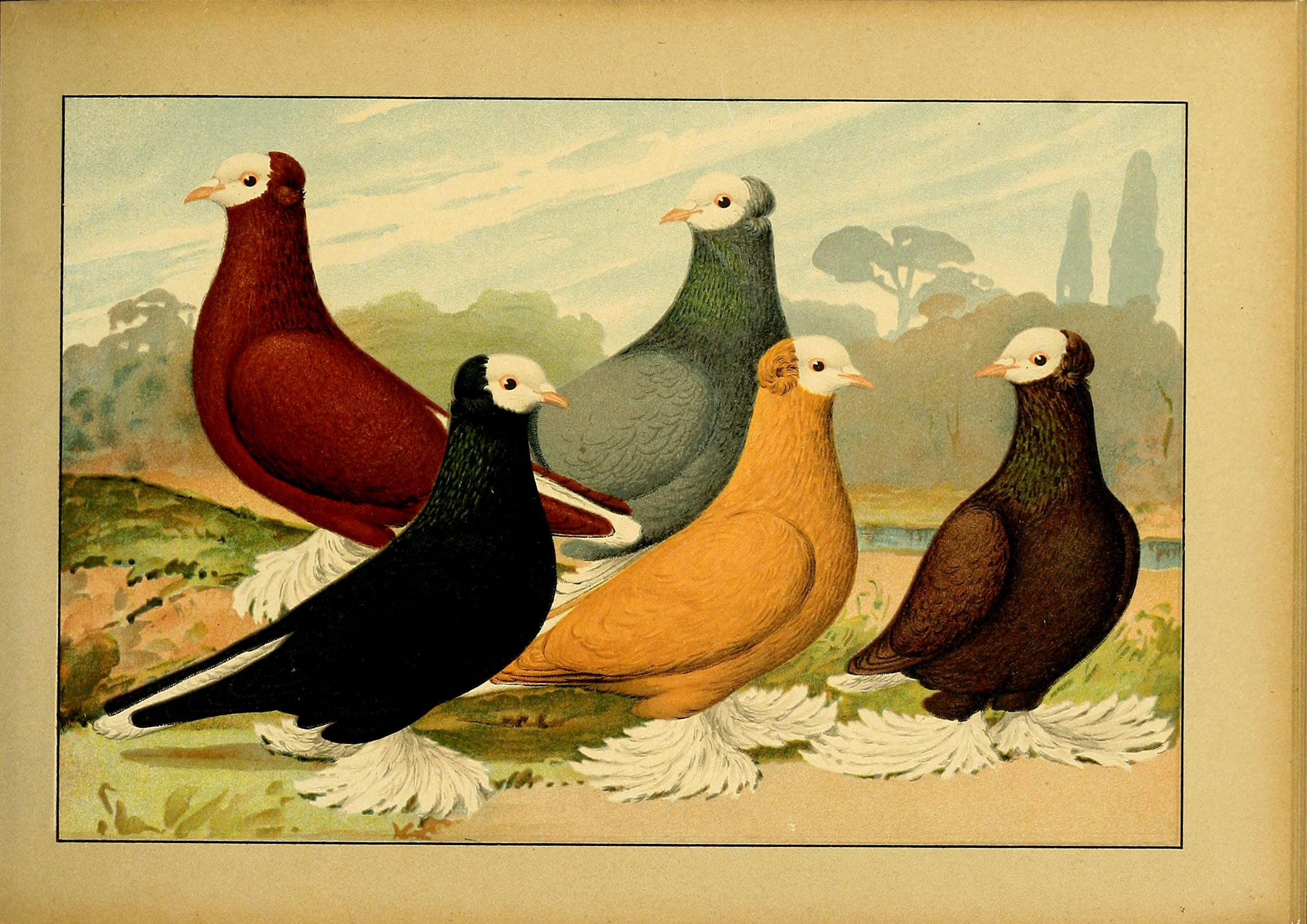 Deutsch